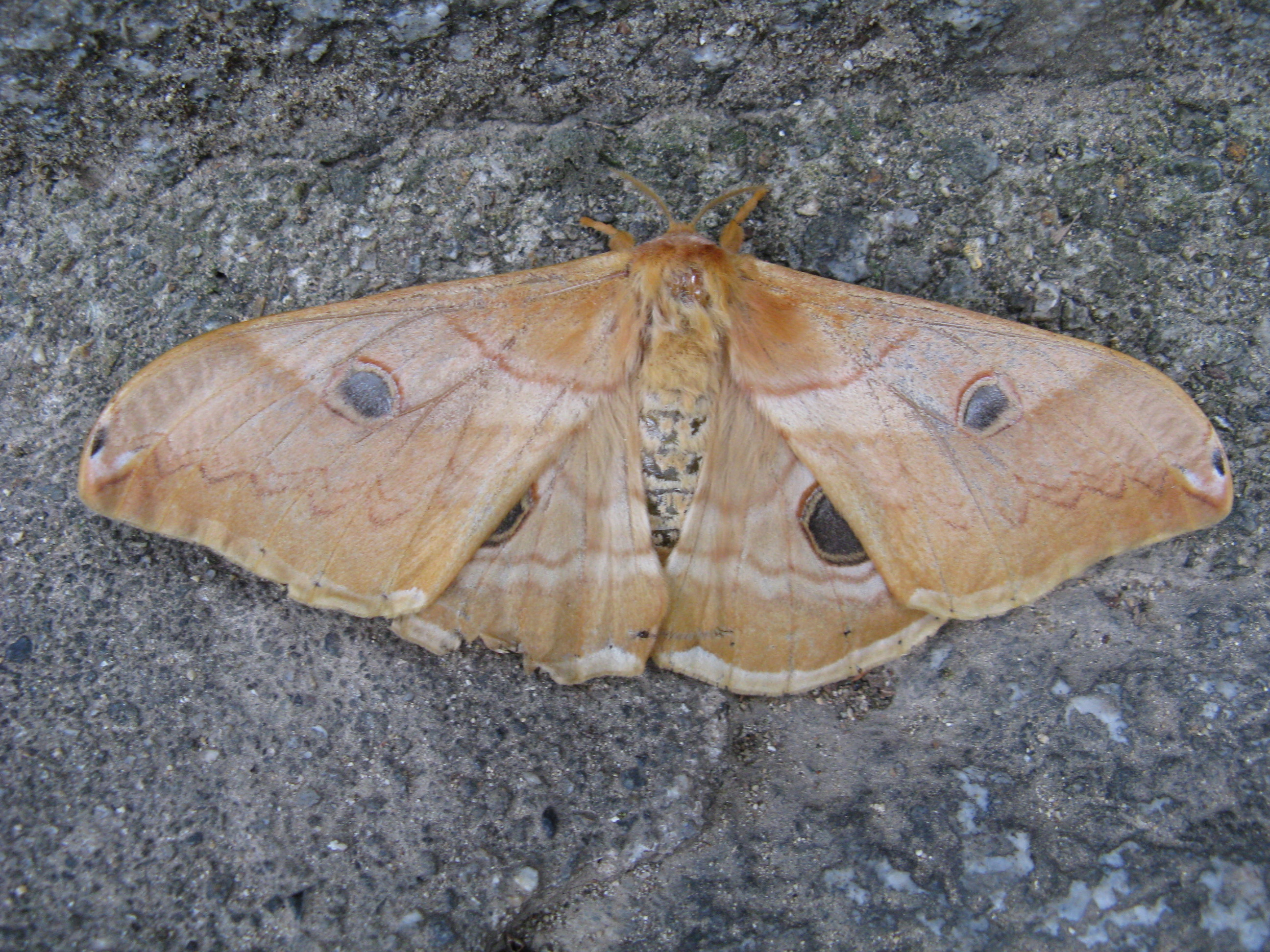 Scientific name Caligula japonica